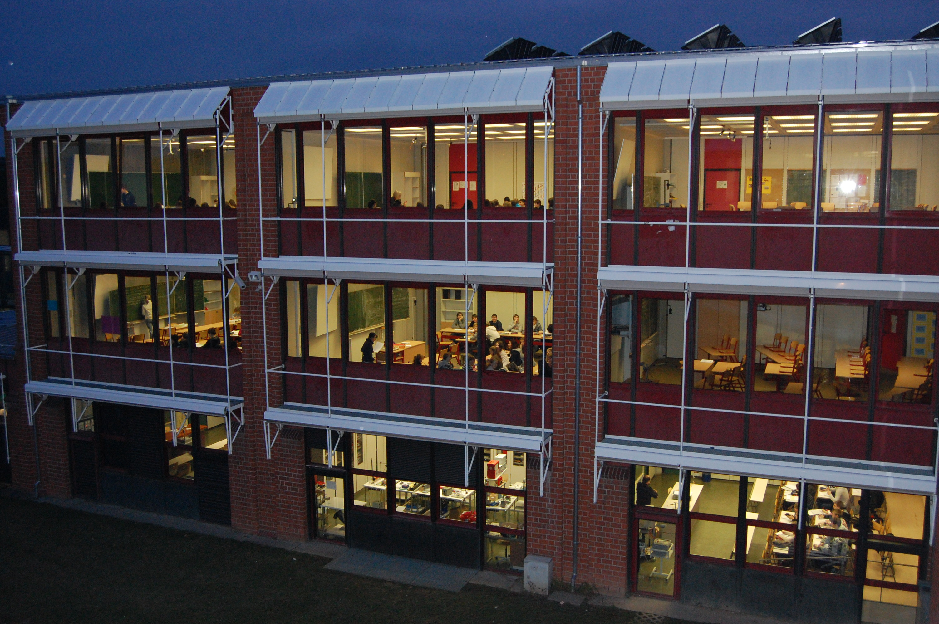 Gymnasium Nieder-Olm: Unterrichts- und Fachräume im Haupttrakt des Altbaus